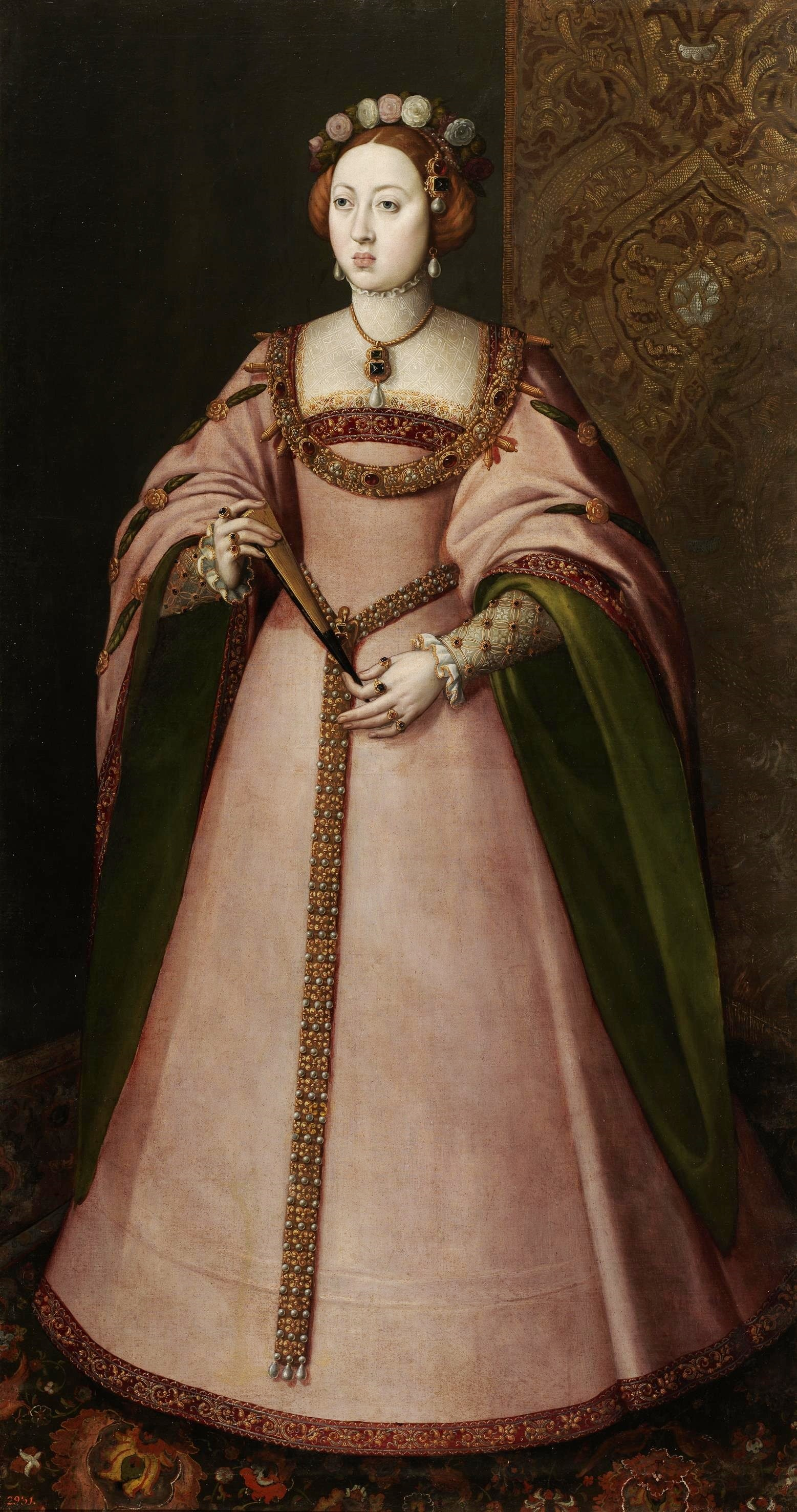 Retrato de la infanta portuguesa María Manuela de Portugal (1527-1545), que fue hija del rey Juan III de Portugal y de la reina Catalina de Austria y princesa consorte de Asturias por su matrimonio con el prícipe Felipe de Austria, que era hijo del emperador Carlos I y llegaría a reinar en España tras la muerte de María Manuela como Felipe II de España.